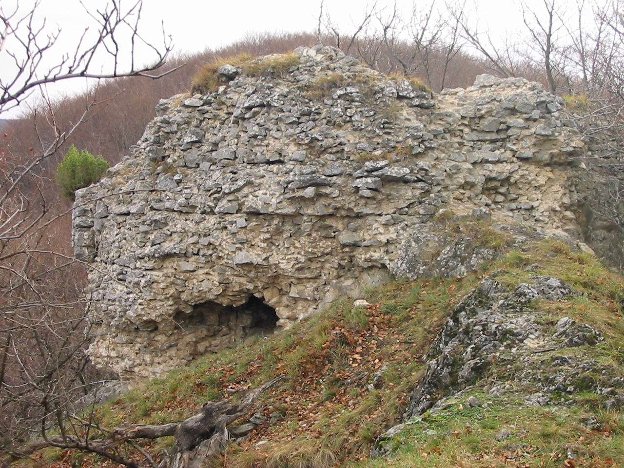 Éleskővár egyetlen megmaradt bástyájának romja